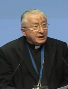 Cardinal Ennio Antonelli lors d’une conférence à Madrid en 2012.